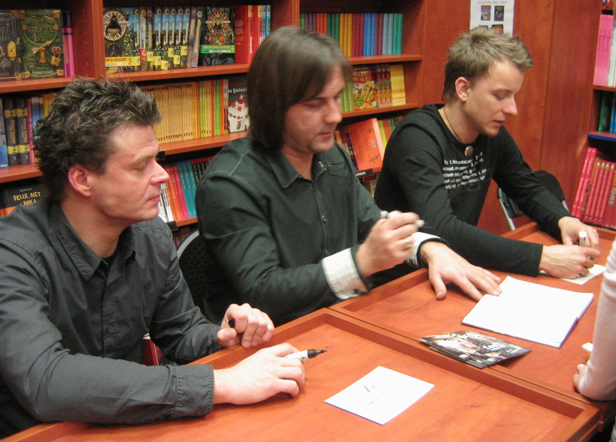 Zespół Feel